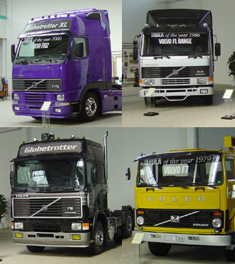 Volvo trucks at Volvo museum in Gothenburg Volvo lastvagnar lastbilar, modeller: Volvo FH12 Globetrotter XL, Volvo FL Range, Volvo F7, Volvo F16, bild(er) tagen av Mangan2002.